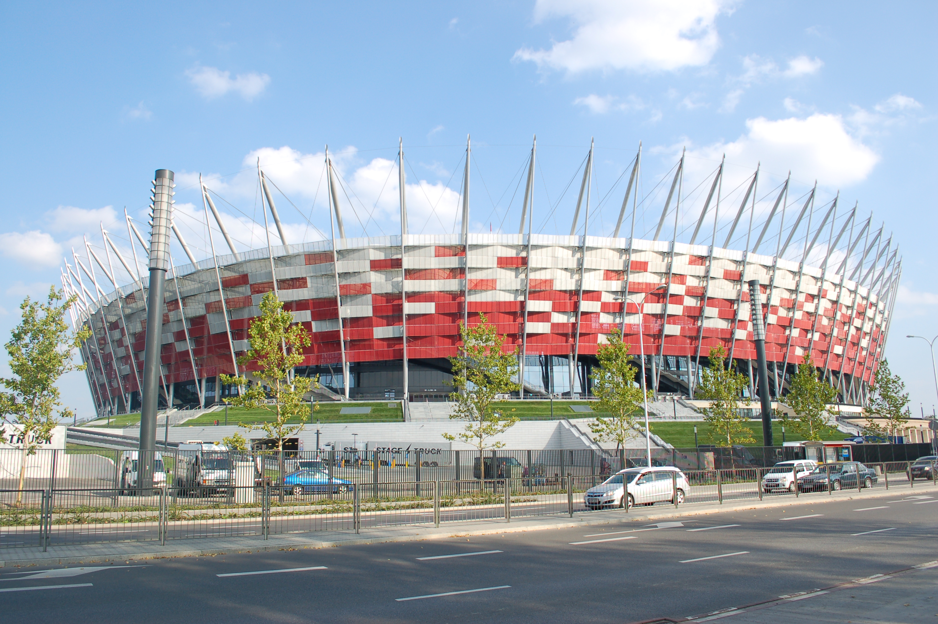 National Stadium Warsaw from Wybrzeże Szczecińskie Street